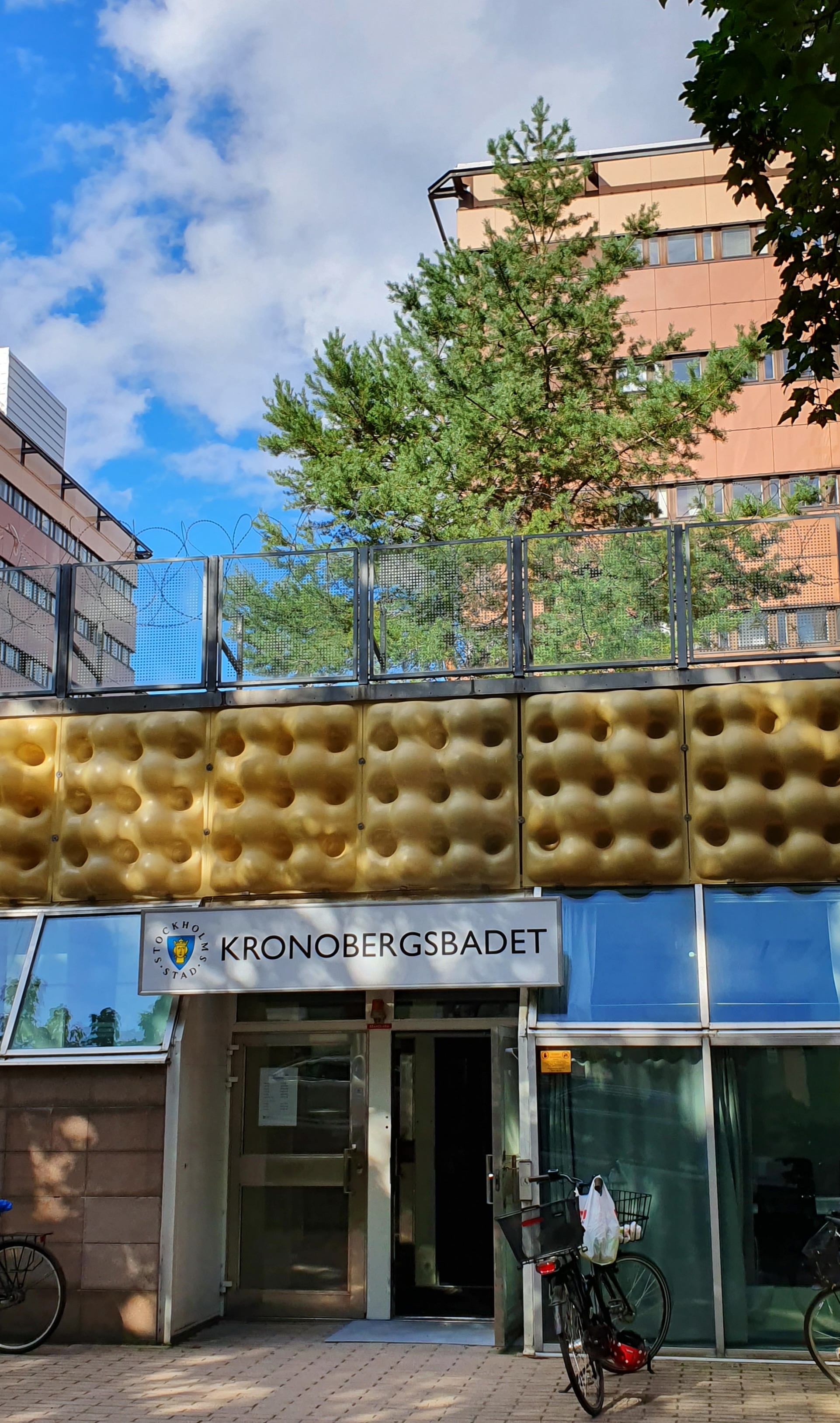 sportanläggning